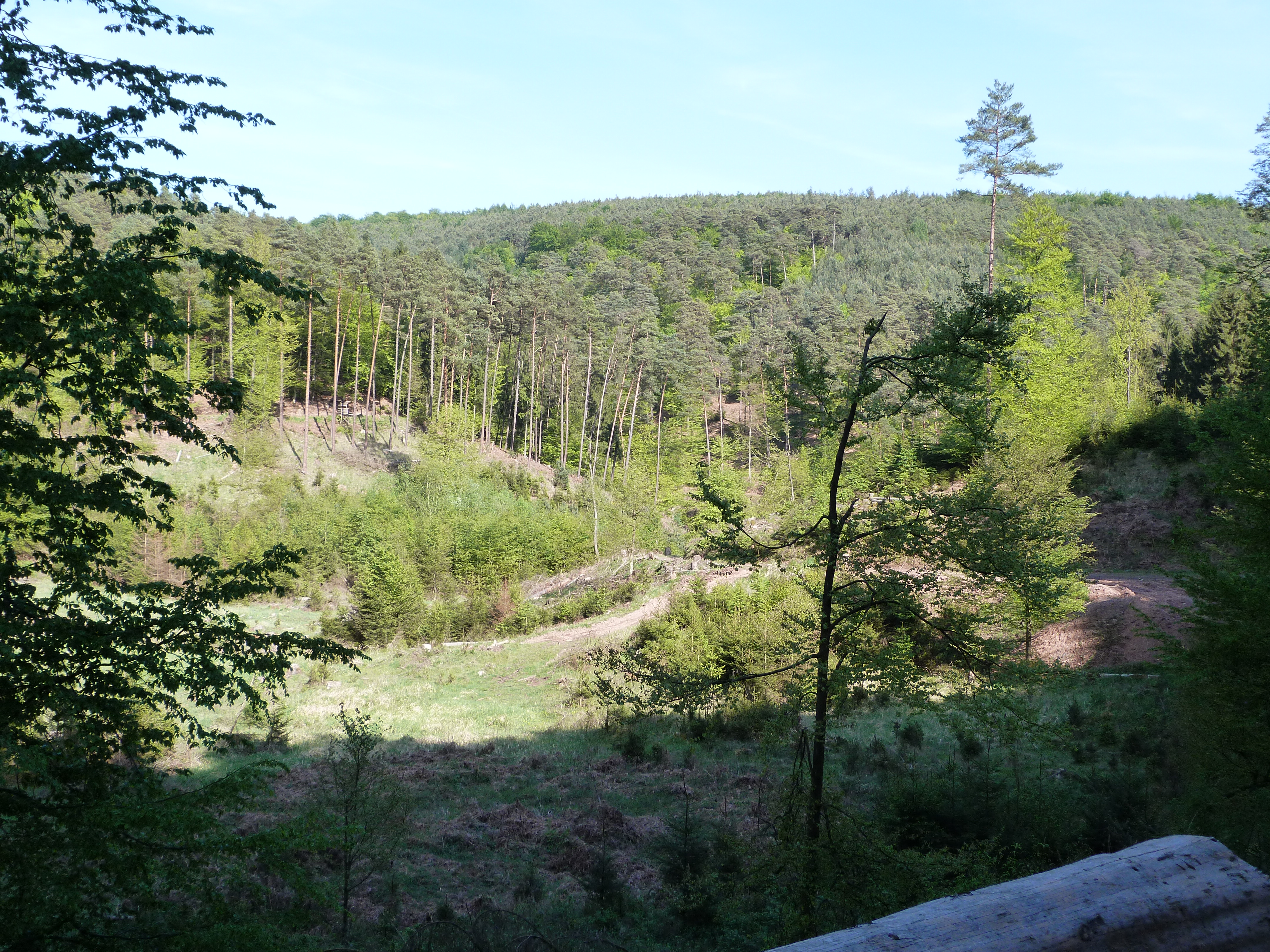 Talkessel der "Unteren Schwemmwasserquelle" bei Wilgartswiesen, aufgenommen am 4. Mai 2014